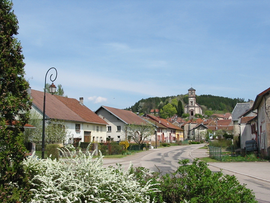 Lusse Commune des Vosges La rue principale Photographie personnelle, prise le 3 mai 2006 Copyright © Christian Amet